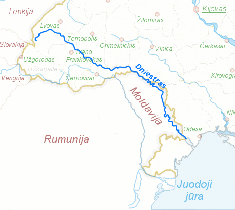 Dniester, a river in Eastern Europe.